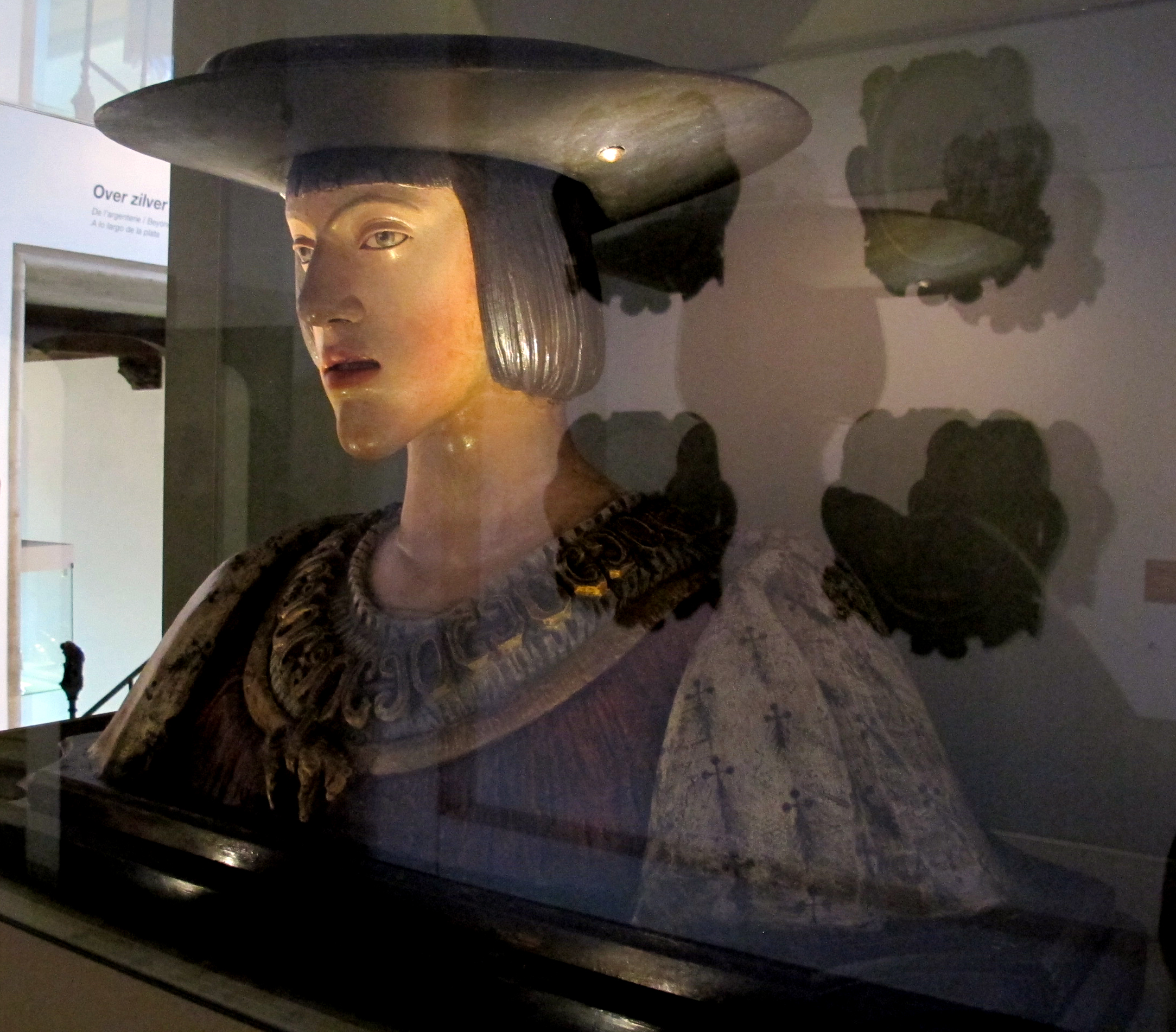 Gruuthuse, busto di carlo V in terracotta, 1520 ca.